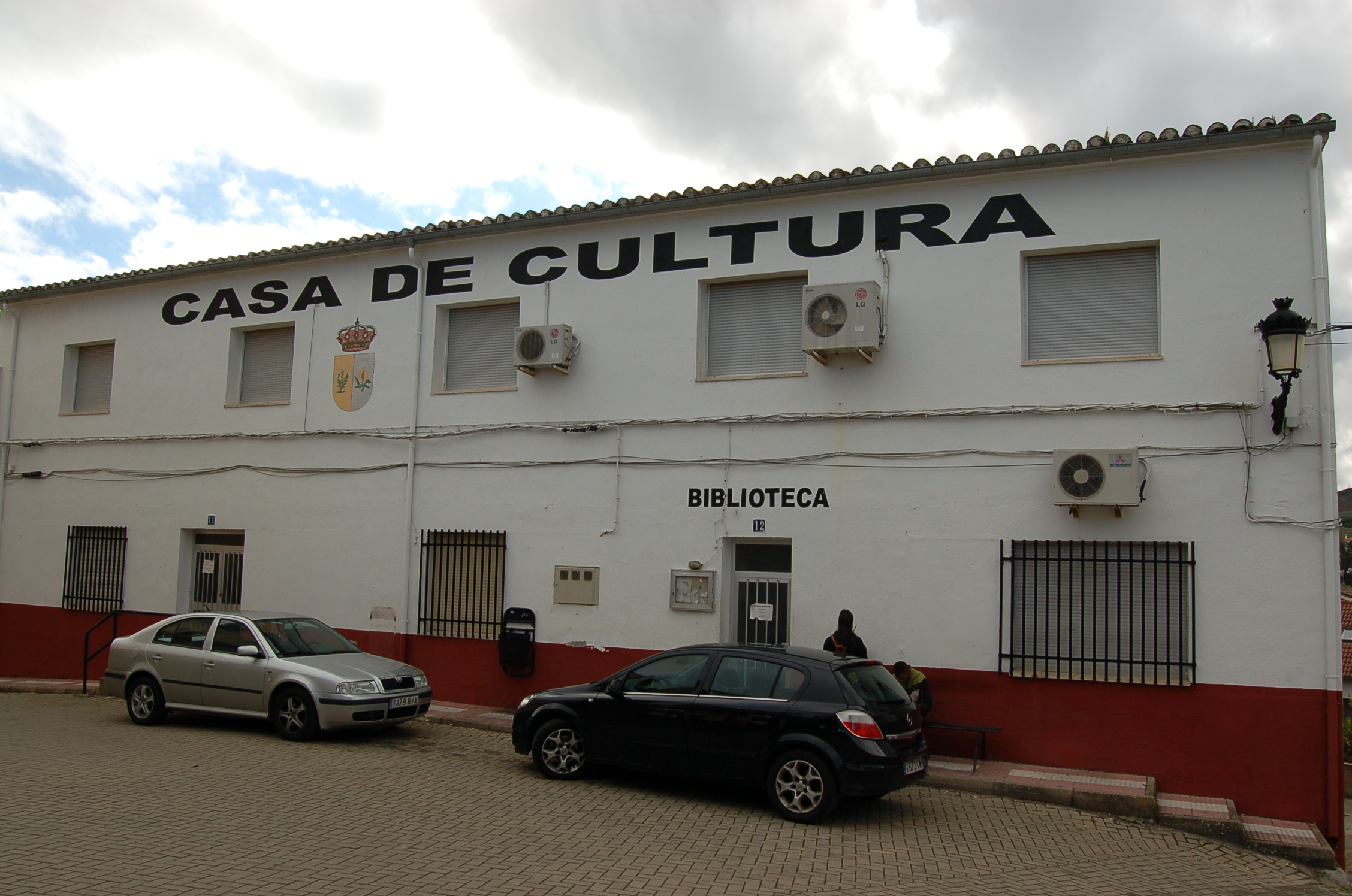 Casa de cultura de Mohedas de Granadilla